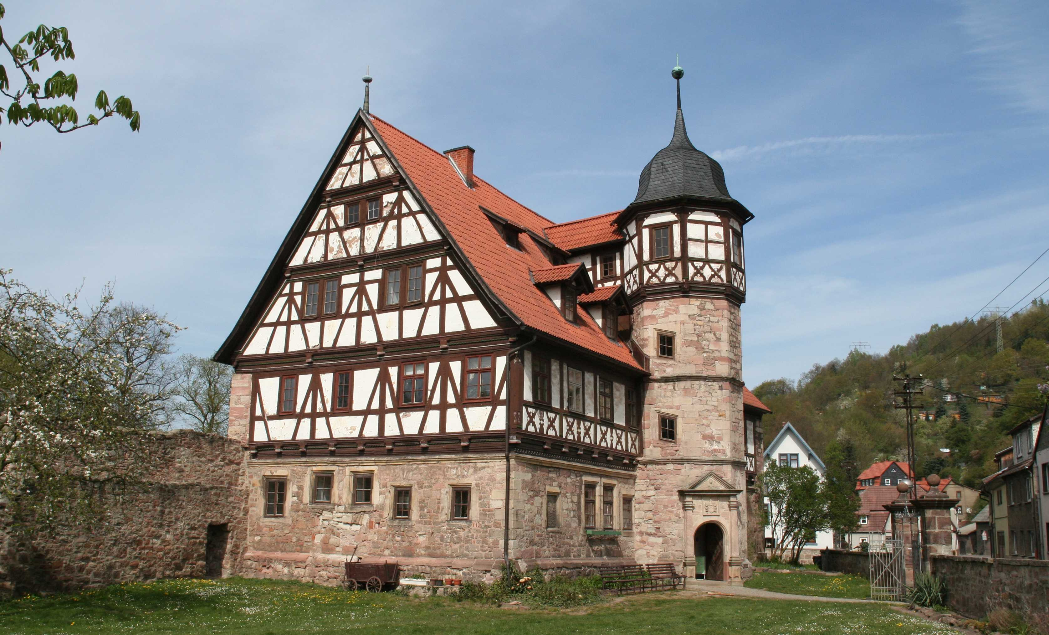 Damenstift in Wasungen, Landkreis Schmalkalden-Meiningen